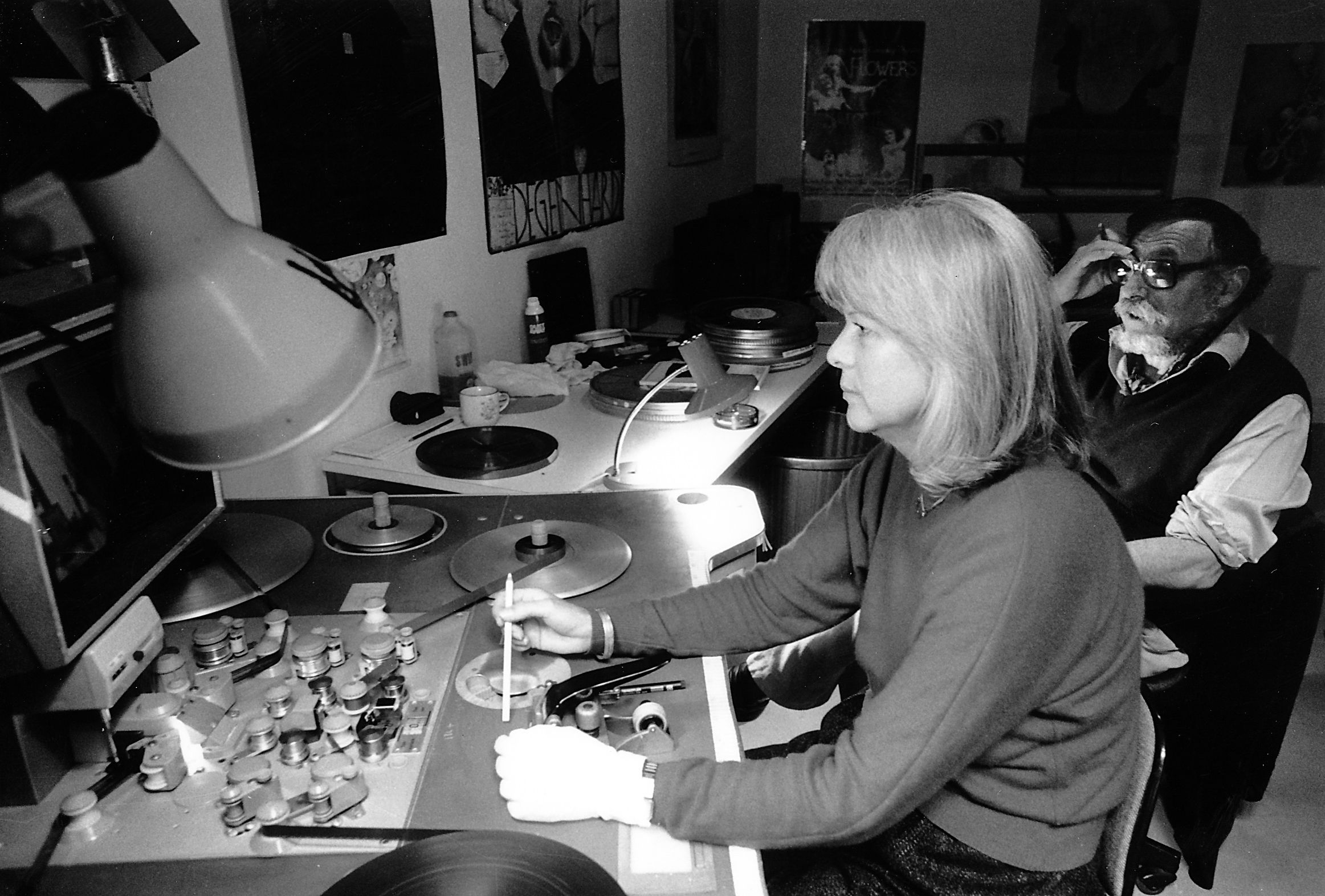 Schnittmeisterin Elfi Kreiter und Dokumentarfilmer Georg Stefan Troller beim Schnitt einer Personenbeschreibung im Schneideraum des Pariser ZDF Studios 1986